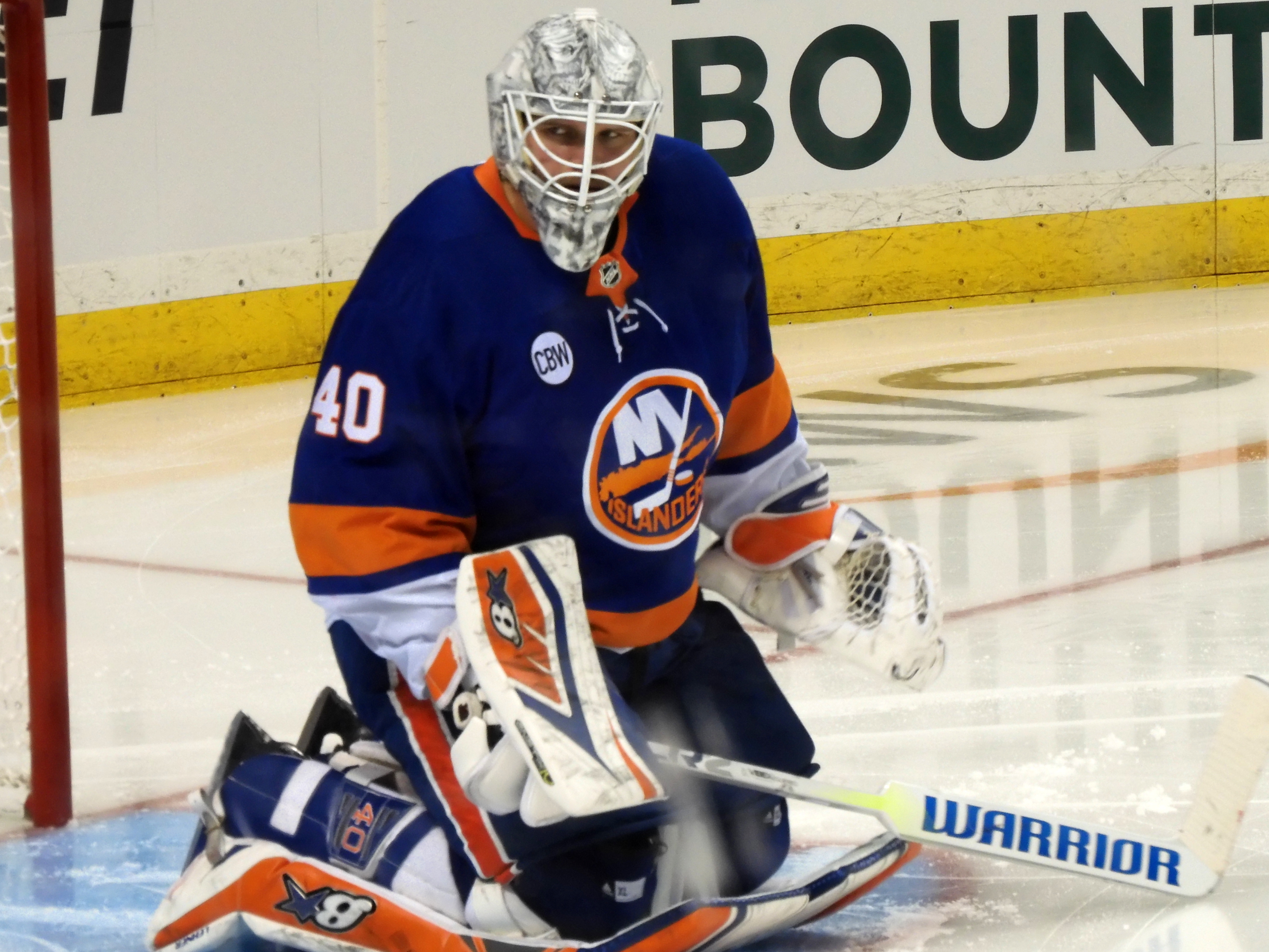 Islanders Goalie Robin Lehner